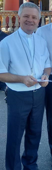 Antônio Emídio Vilar, bispo de São João da Boa Vista